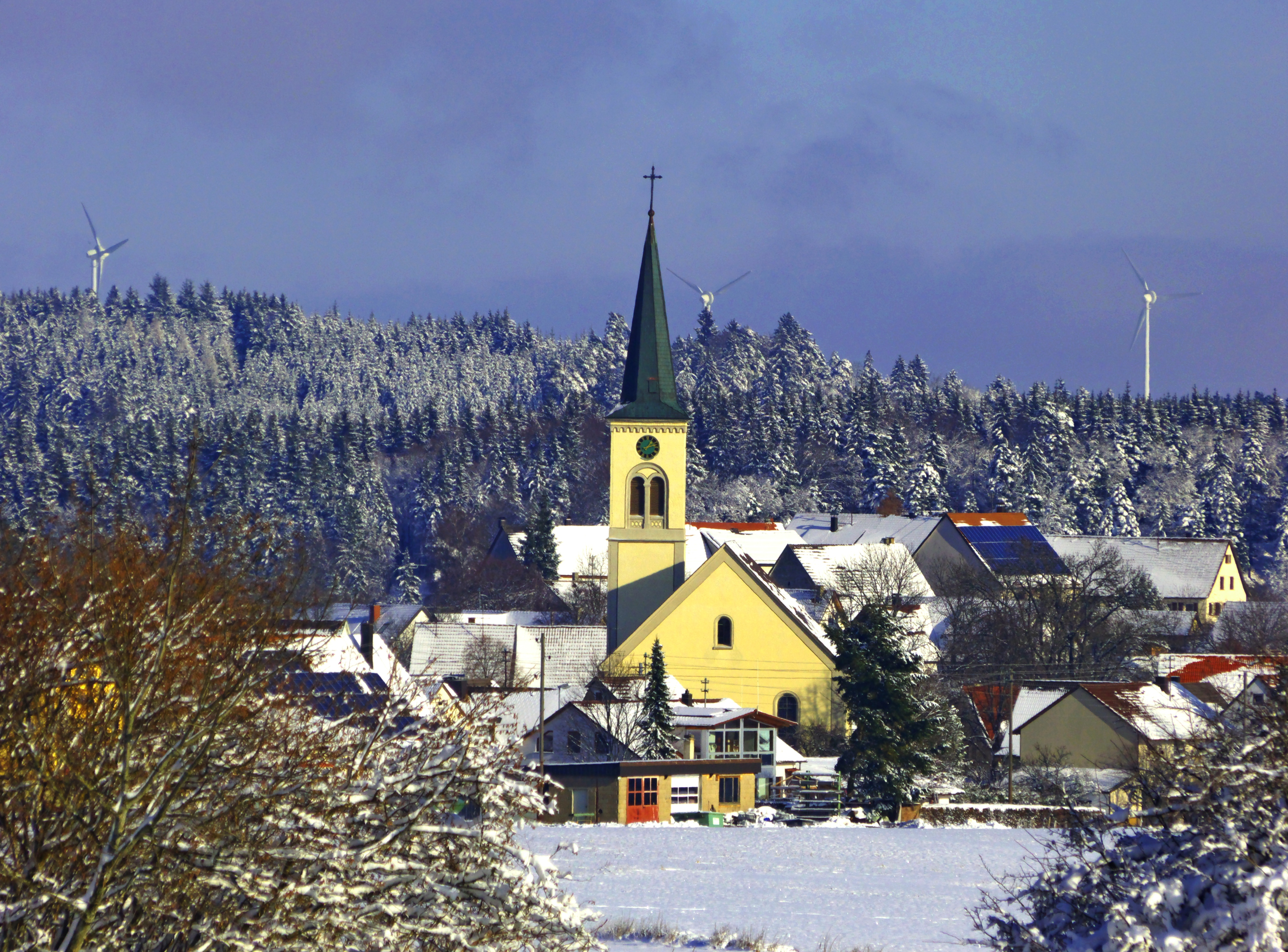 The Church Of Mahlstetten